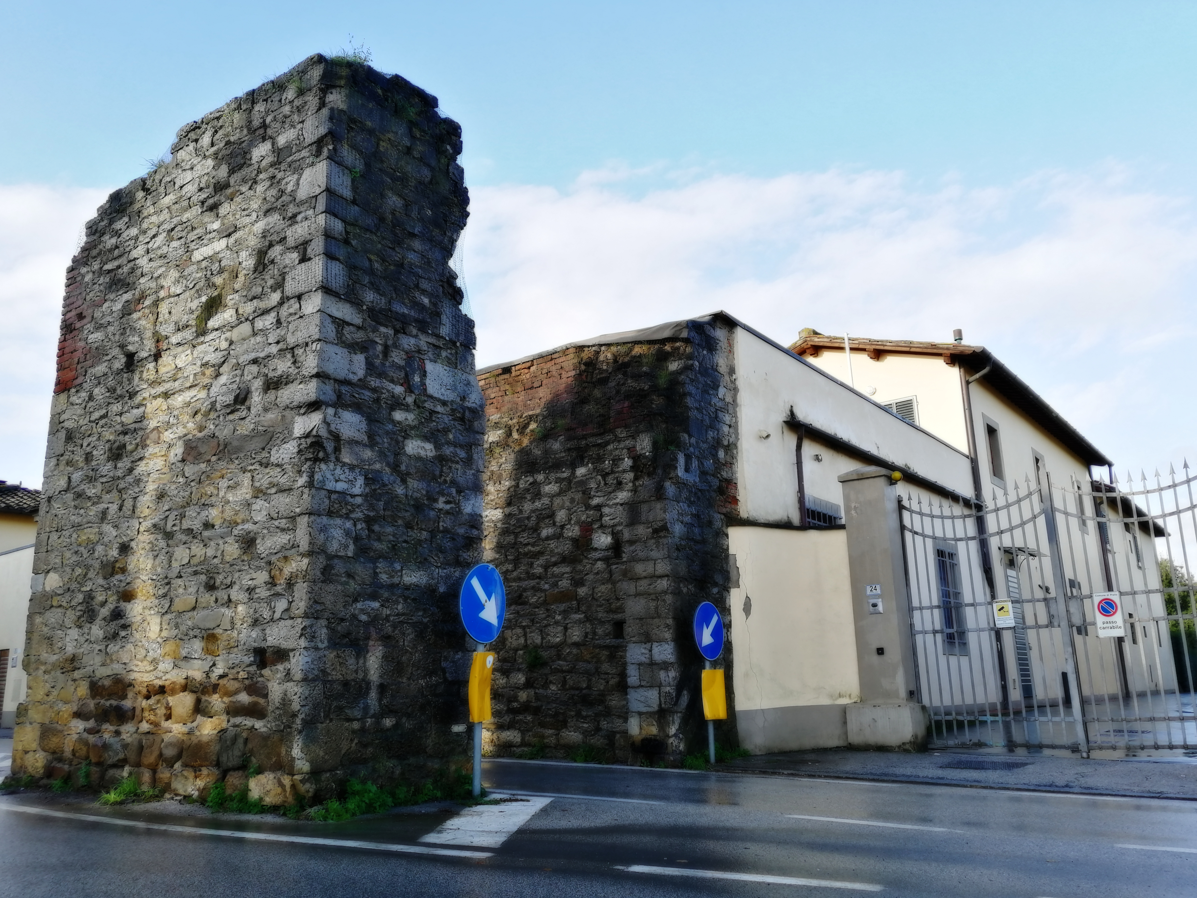 La torre di castelnuovo 2019